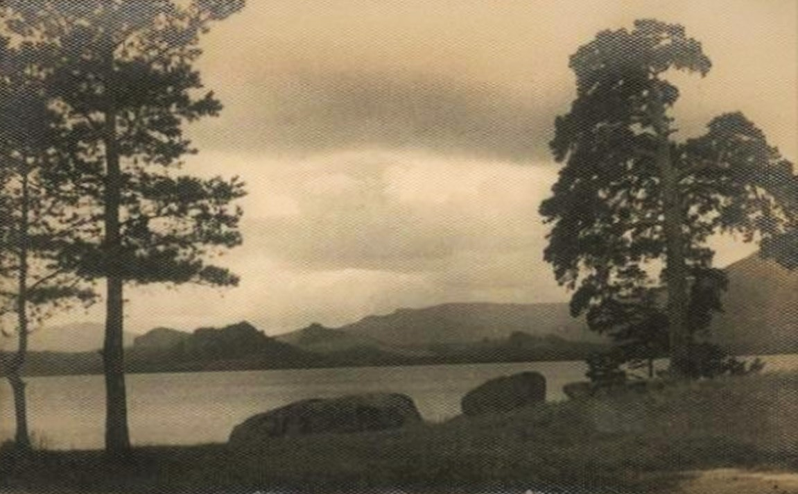 Боровое. Пейзаж